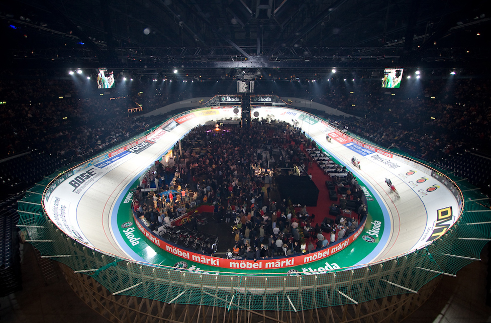 Sixdays Zürich 2007